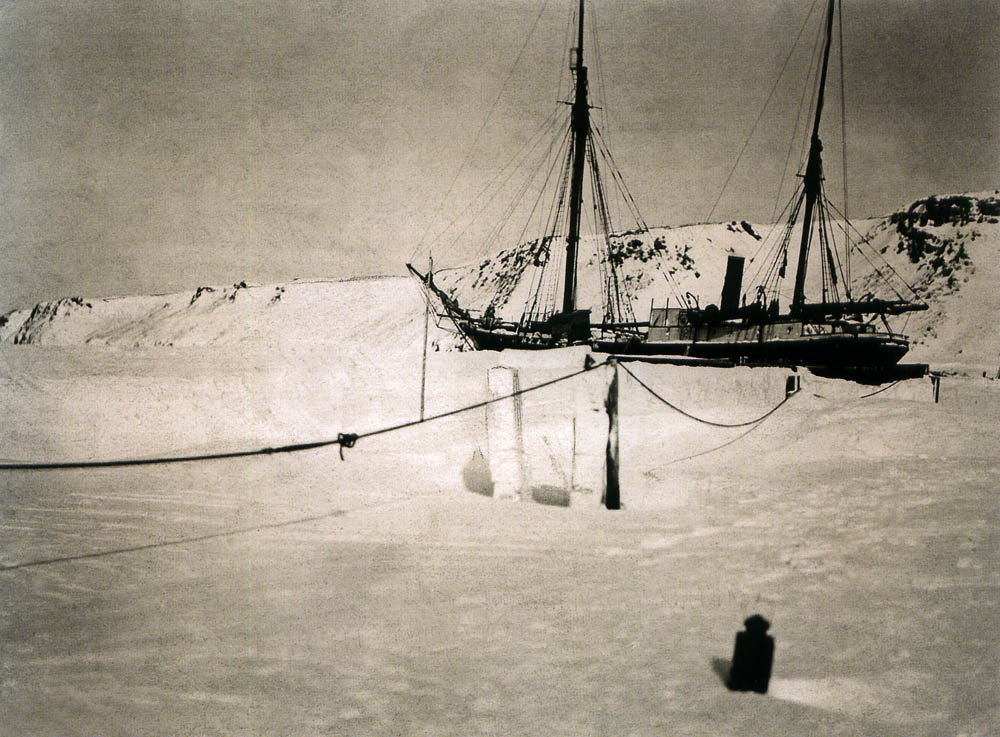 Зимовка судна "Святой мученик Фока" возле Новой Земли в 1912-1913 либо 1913-1914 годах.